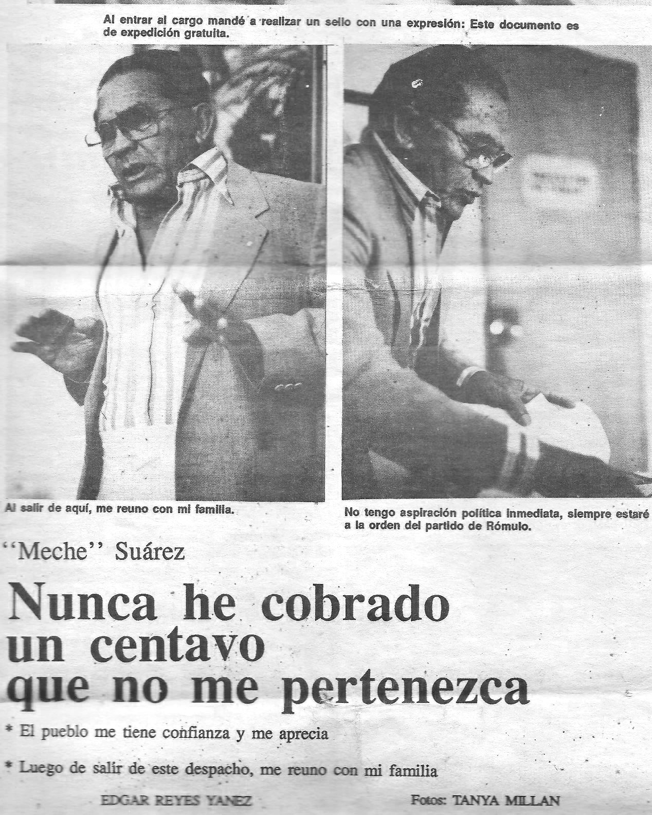 Declaraciones en la prensa Prefecto Cesar Suarez